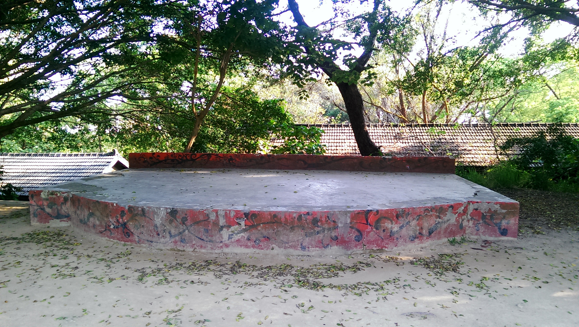 中文（台灣）: 彰化藝術高中第二校區原軍用集會台